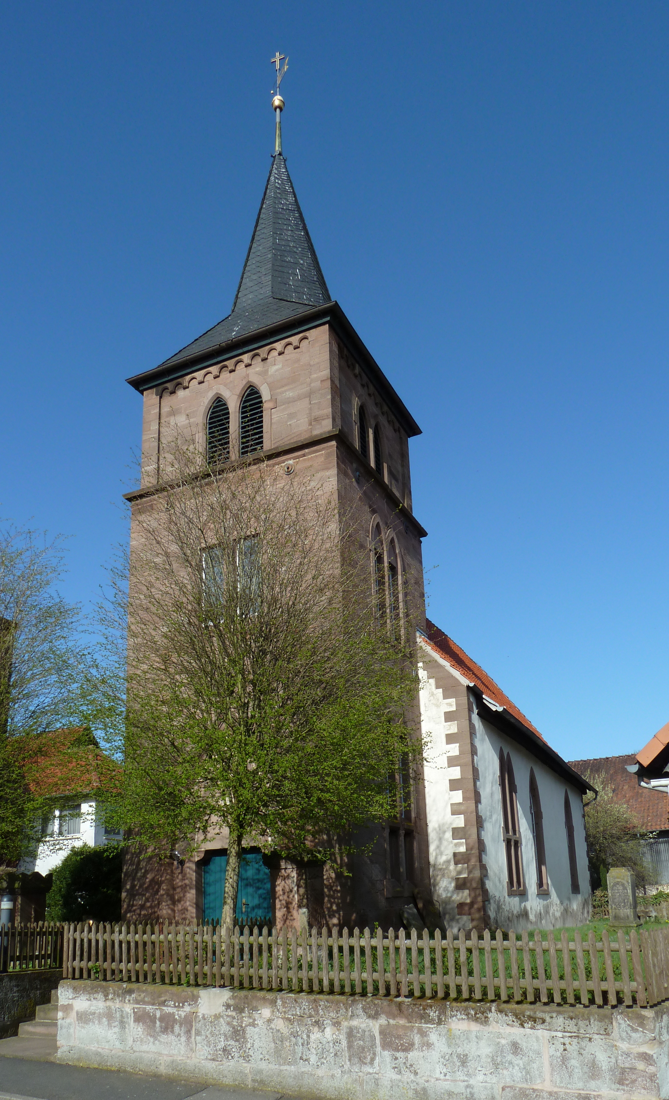 Blick von Südwesten auf die ev.-luth. Kirche in Parensen, Flecken Nörten-Hardenberg, Landkreis Northeim, Niedersachsen. Verputzter Rechtecksaal gegen Ende des 18. Jahrhunderts instandgesetzt (so nach Denkmaltopographie; Mithoff gibt an, die Kirche sei 1776 erbaut), 1892 erweitert, Kirchturm errichtet und Fenster des Kirchenschiffs umgestaltet